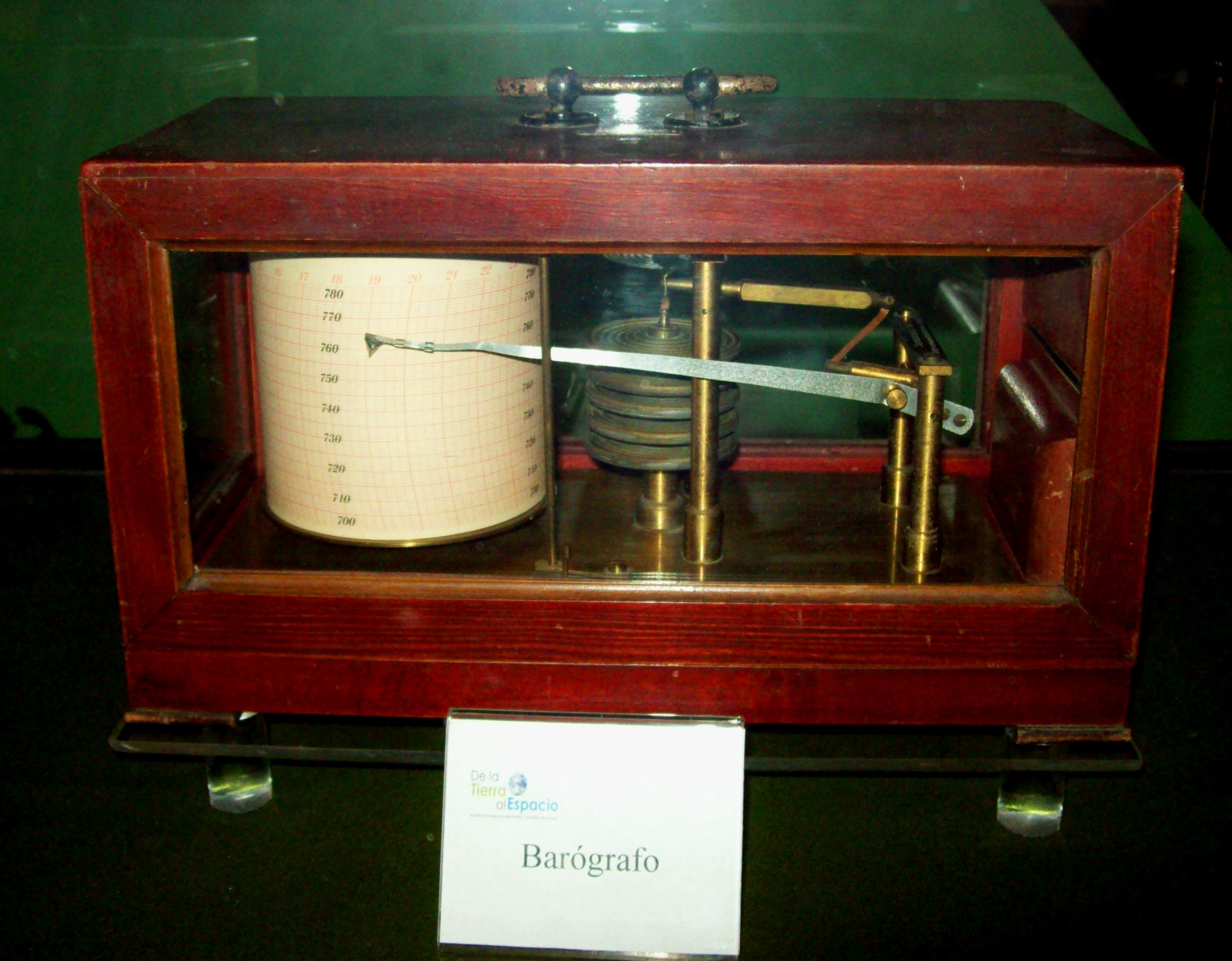 Barógrafo en el Museo de astronomía y geofísica, La Plata.